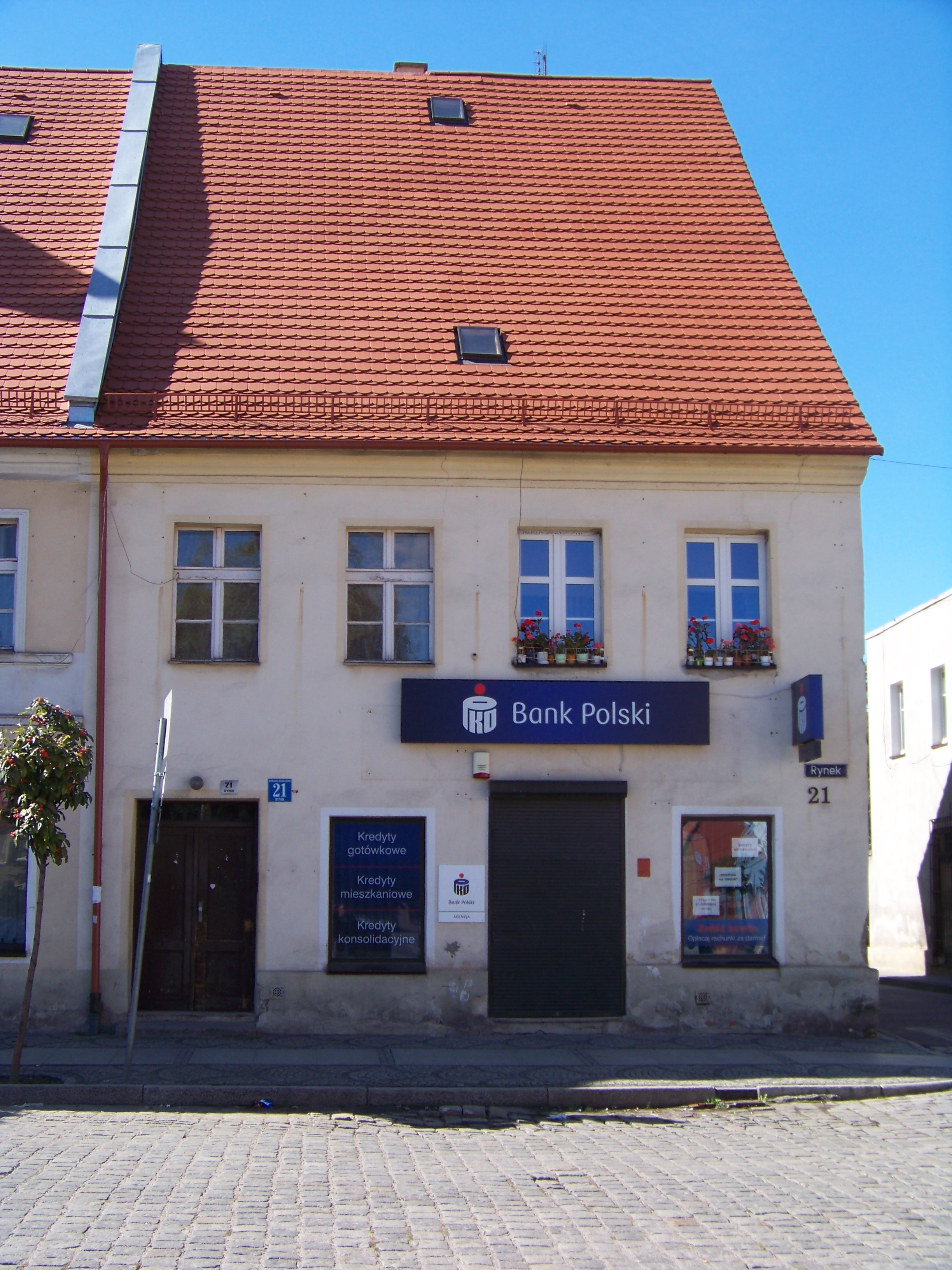 dom - widok od frontu Lewin Brzeski, Rynek 21, Lewin Brzeski 03.1966.